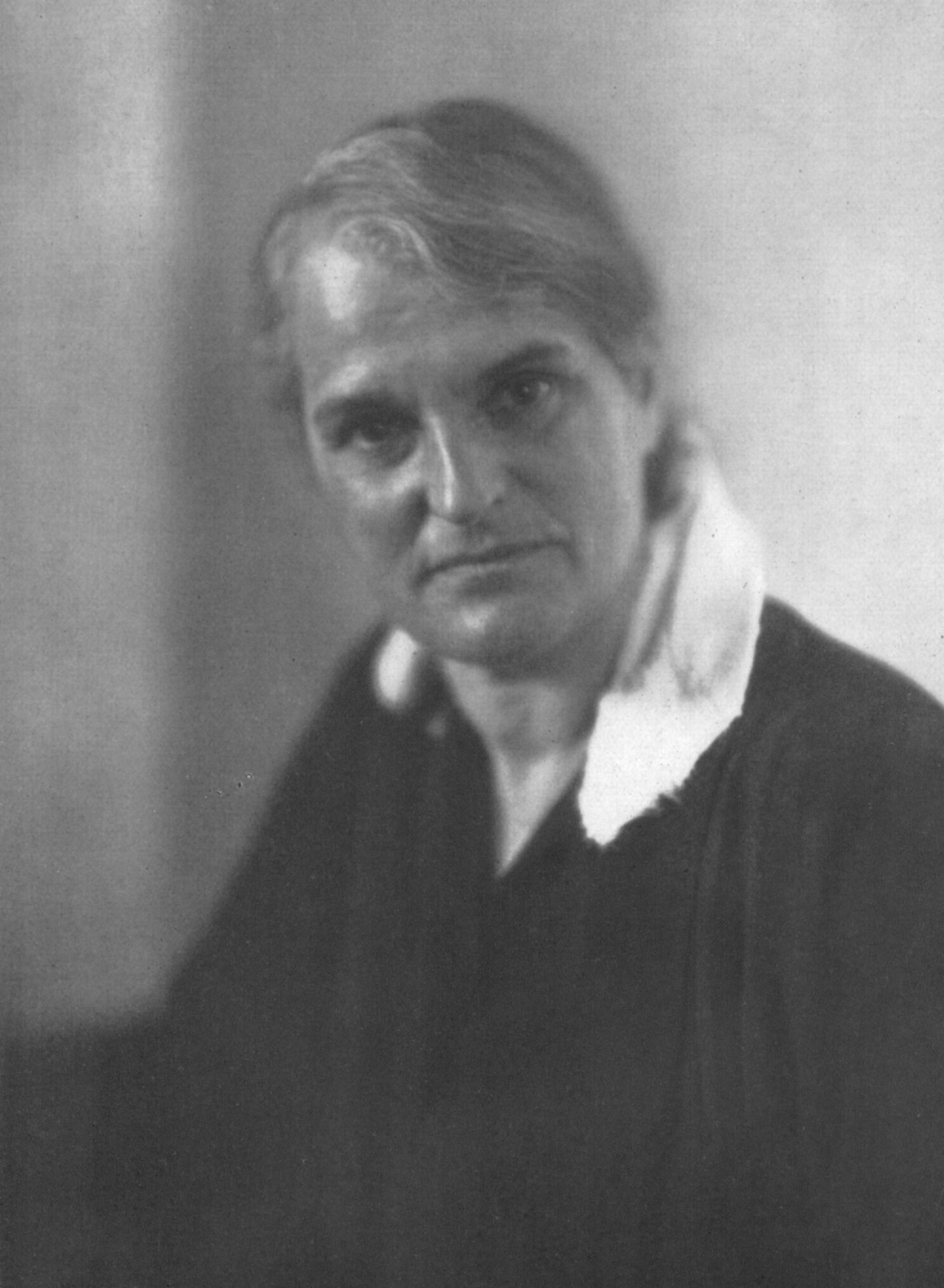 Porträt Clara Rilke/Clara Westhoff, Foto von Wanda von Debschitz-Kunowski (1870-1935)